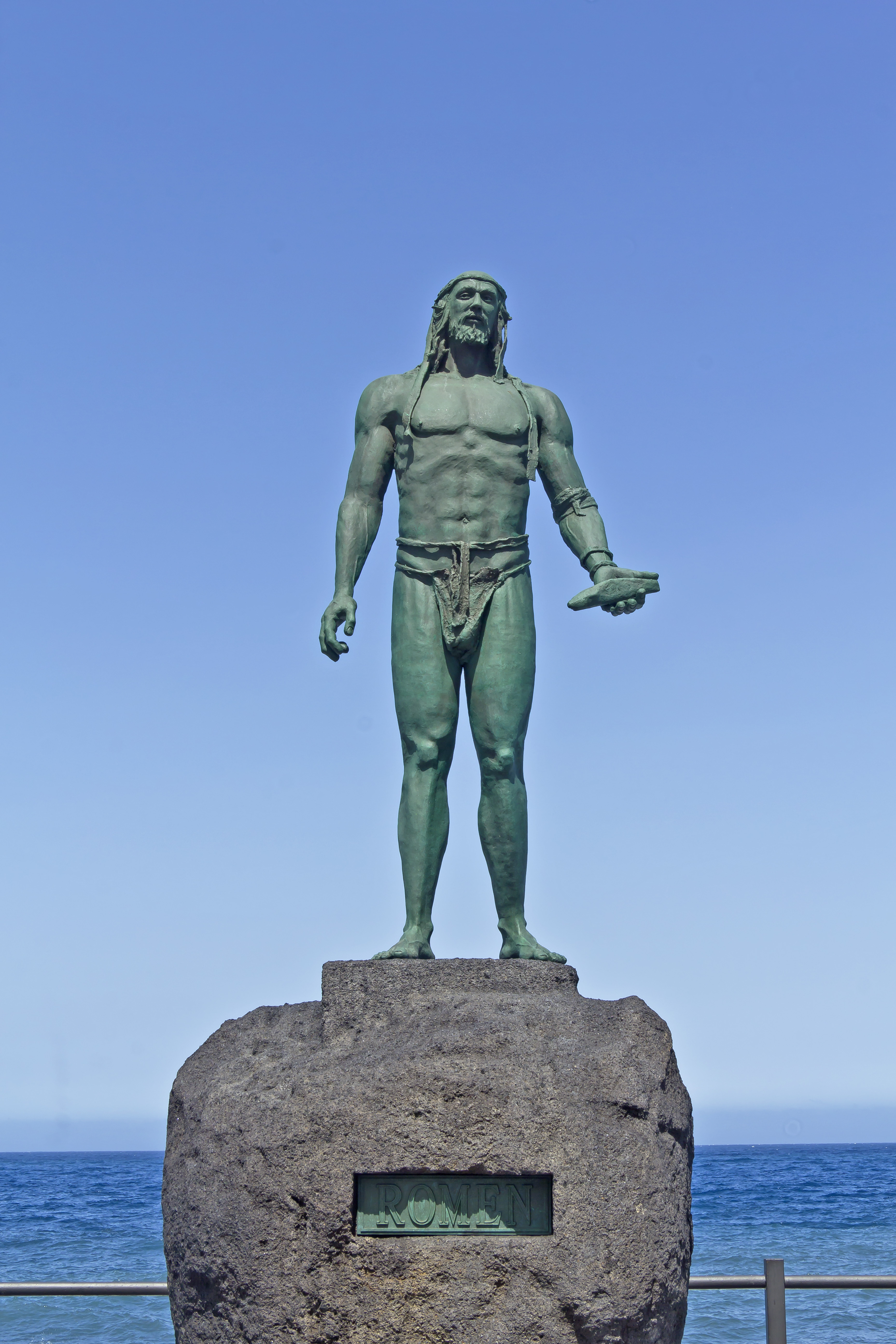 Die Plastik des Mencey Romén auf der Plaza de la Patrona de Canarias in Candelaria, Teneriffa, Spanien wurde von José Abad geschaffen